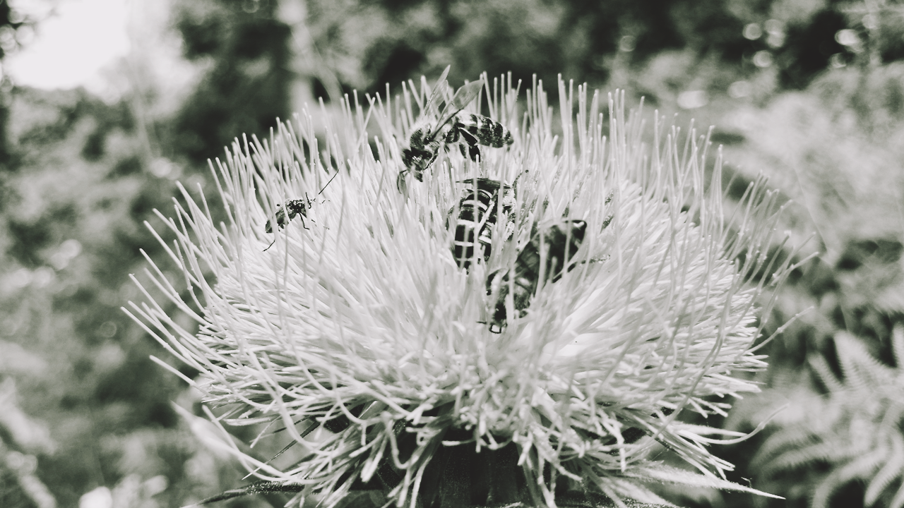 Bir bitki üzerindeki böcekler.